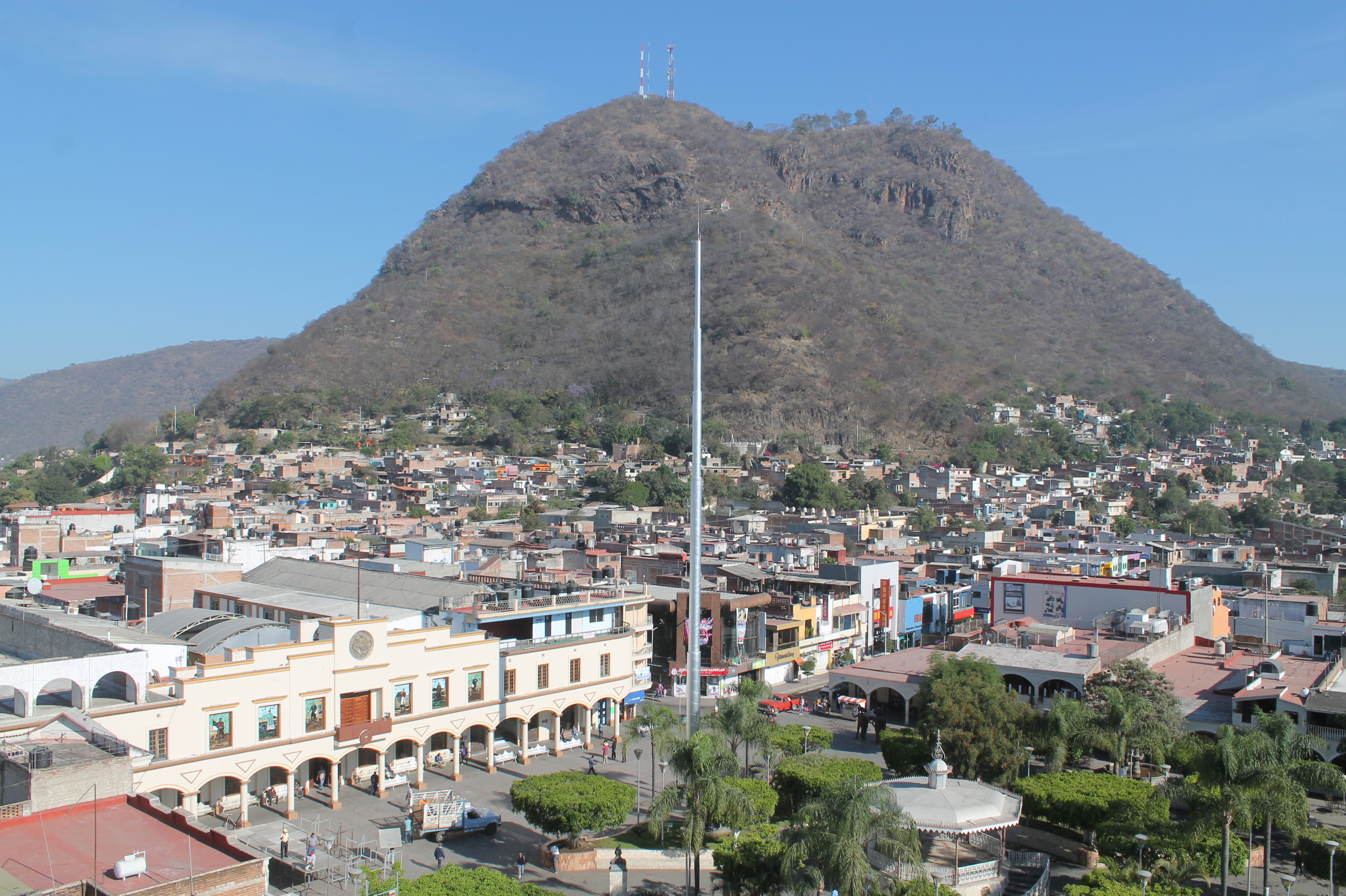 Centro Historico